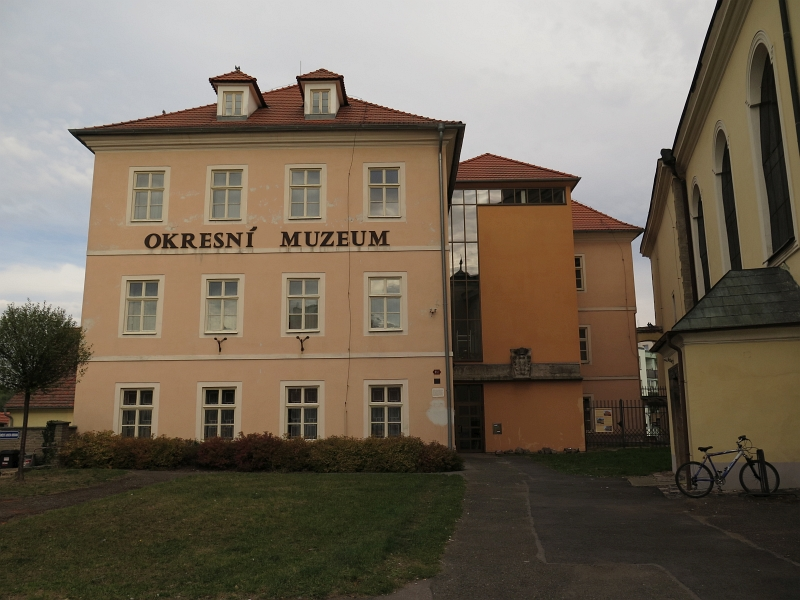 Muzeum, náměstí Josefa Urbana 141, Střed, Rokycany.